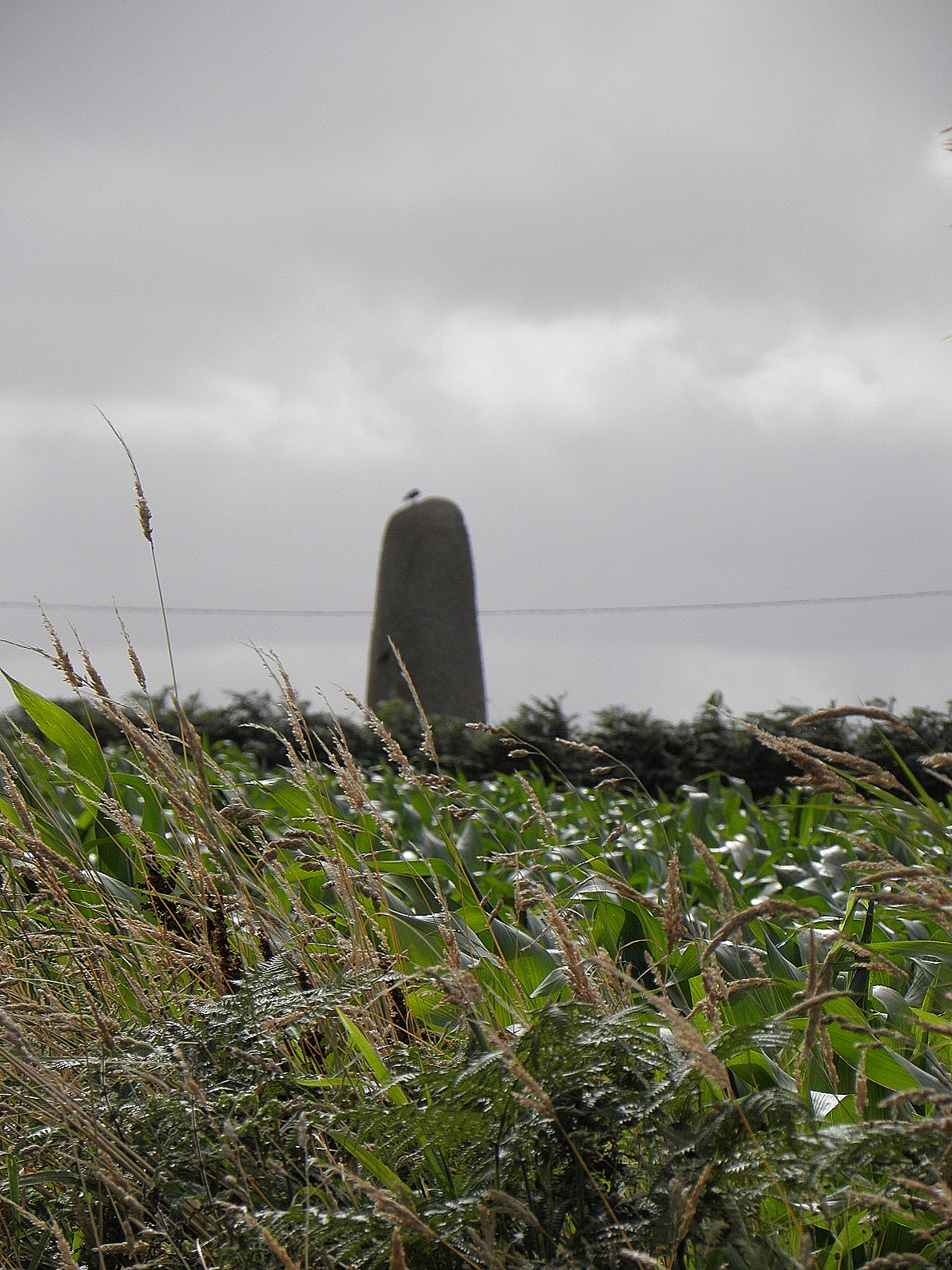 Menhir de Saint-Gonveld sis à Saint-Gonvarc'h en Porspoder (29).